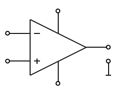 schematicka znacka operacny zosilnovac